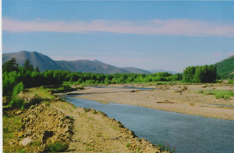 Речка Медвежья